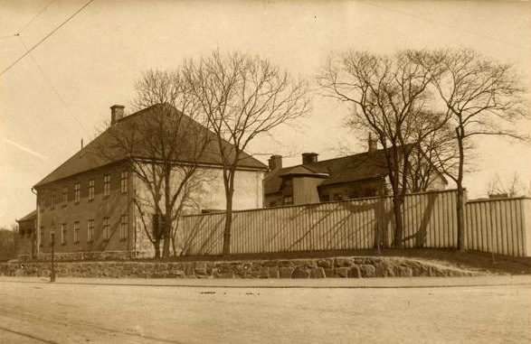 Spinnhuset, Gullbergsbro, Göteborg. Exteriör.